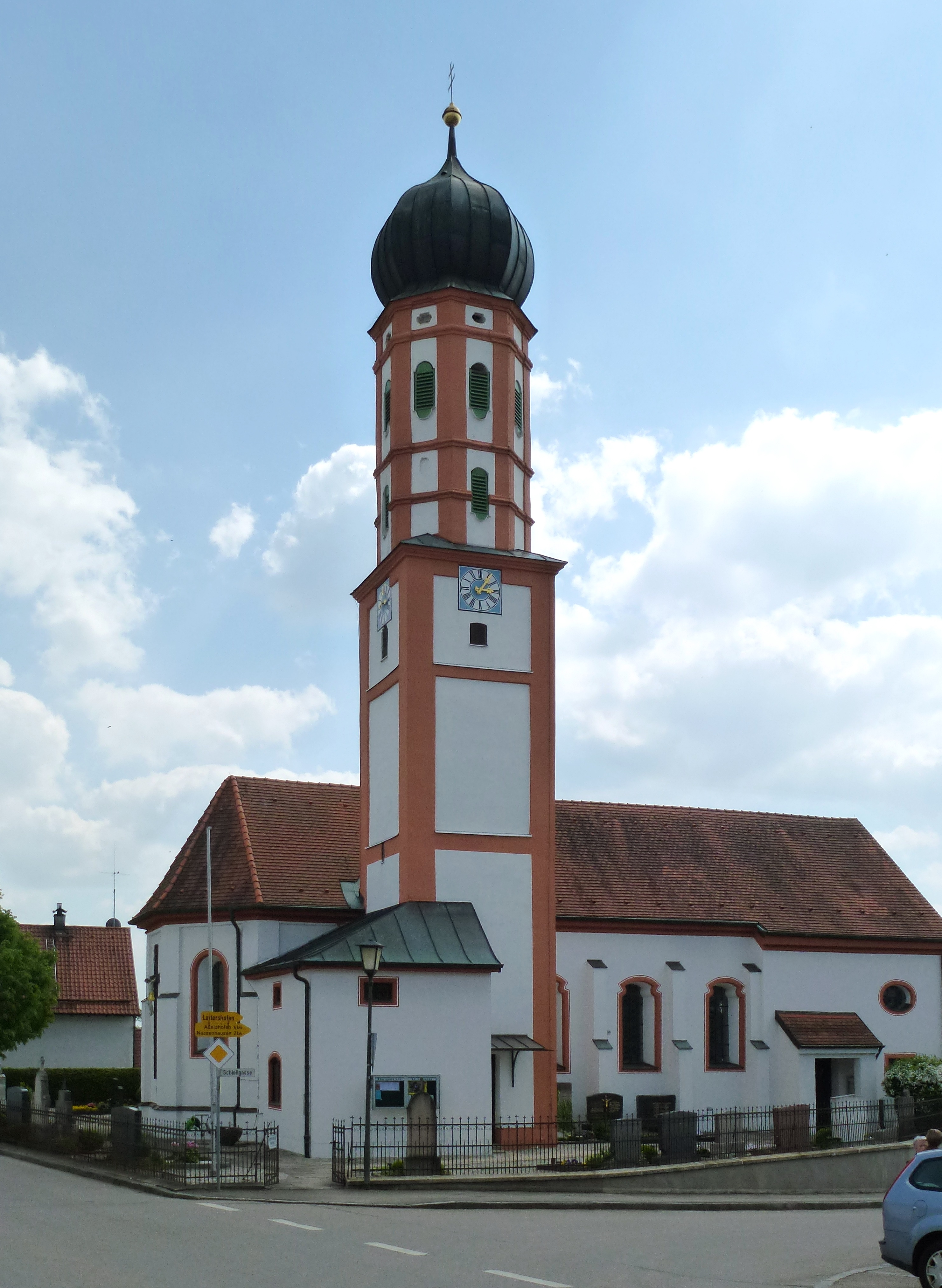 Hattenhofen Nähe Schloßgasse: Katholische Kuratiekirche St. Johann Baptist. Ansicht von N